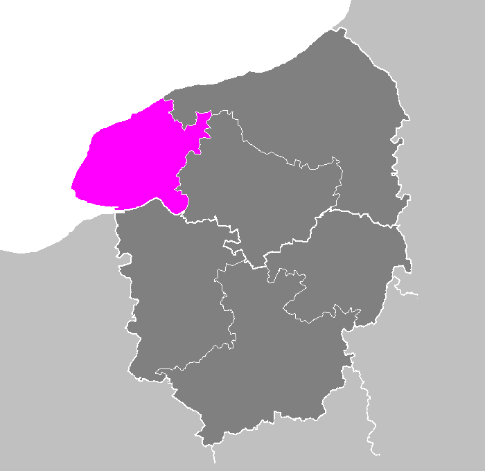 Maps of arrondissements and cantons of France: Arrondissement du Havre.PNG